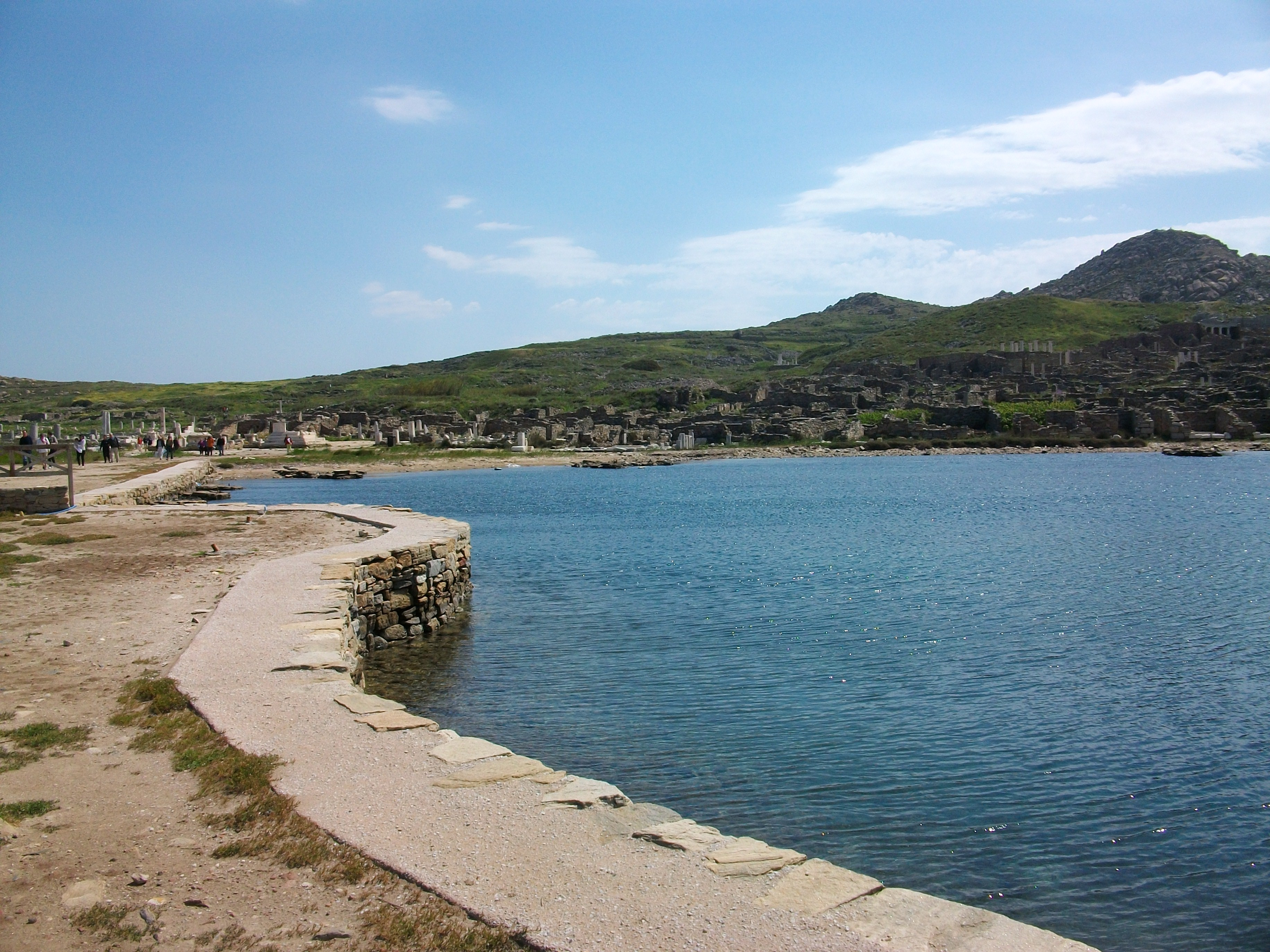 Vista de Delos des del port.